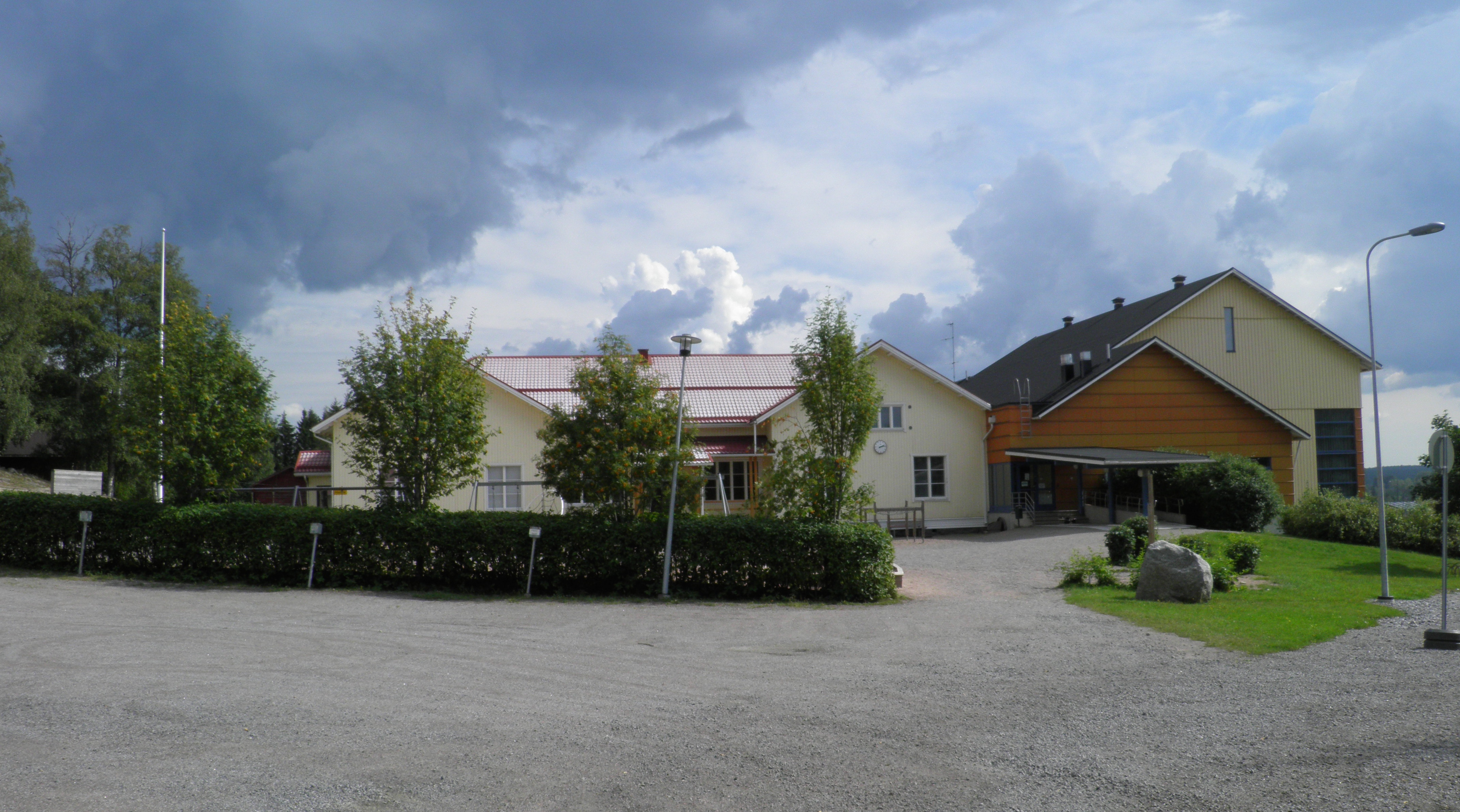 Häijään koulu ja päiväkoti Sastamalassa.